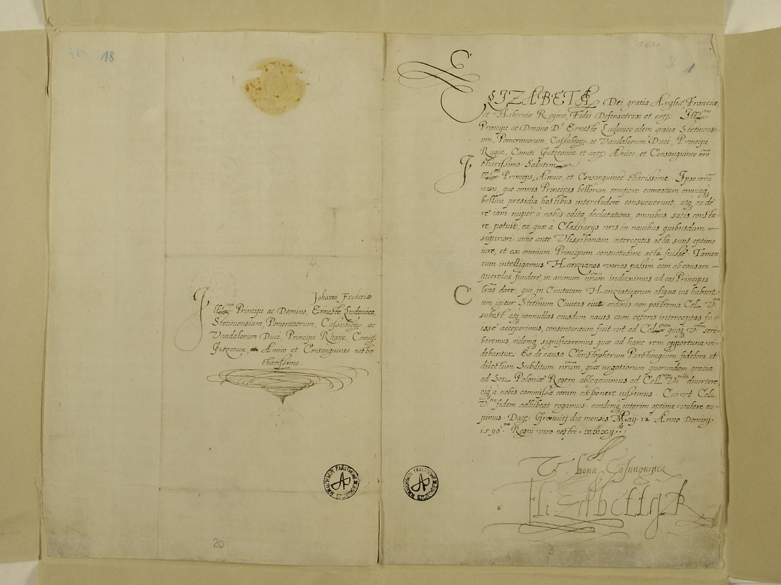 Informacja o statkach kupców szczecińskich płynących do Portugalii, które zostały zatrzymane przez flotę angielską, gdyż złamały ogłoszoną przez królową Elżbietę blokadę portów hiszpańskich i portugalskich podczas konfliktu z królem Filipem II. Anglia pod panowaniem Elżbiety I (1558–1603) była stale zagrożona przez ekspansję katolickich hiszpańskich Habsburgów. Ten religijno-polityczny konflikt trwał z krótkimi przerwami przez cały XVI wiek (od czasów panowania Henryka VIII). Apogeum zagrożenia Anglii nastąpiło w 1588 roku, kiedy Filip II wysłał przeciwko niej flotę inwazyjną zwaną „Wielką Armadą”. Zła pogoda oraz działania angielskich kaprów udaremniły jednakże plany hiszpańskiego monarchy. Jednym z elementów walki Elżbiety z Hiszpanią było popieranie rewolucji w będących pod panowaniem Habsburgów Niderlandach, a także zwalczanie handlu morskiego i blokada portów iberyjskich przez flotę angielską, m.in. w 1587 roku Francis Drake zaatakował okręty hiszpańskie w porcie w Kadyksie i 10 z nich zatopił. Klęska „Wielkiej Armady” stała się również początkiem budowy angielskiego (brytyjskiego) panowania na morzach, co zostało ugruntowane w XVII i XVIII wieku. Opis: Oryginał, jęz. łaciński, papier, 225x175 mm, pieczęć opłatkowa, podpis Elżbiety królowej Anglii, 2 karty; Miejsce: Greenwich Autor komentarza: Paweł Gut